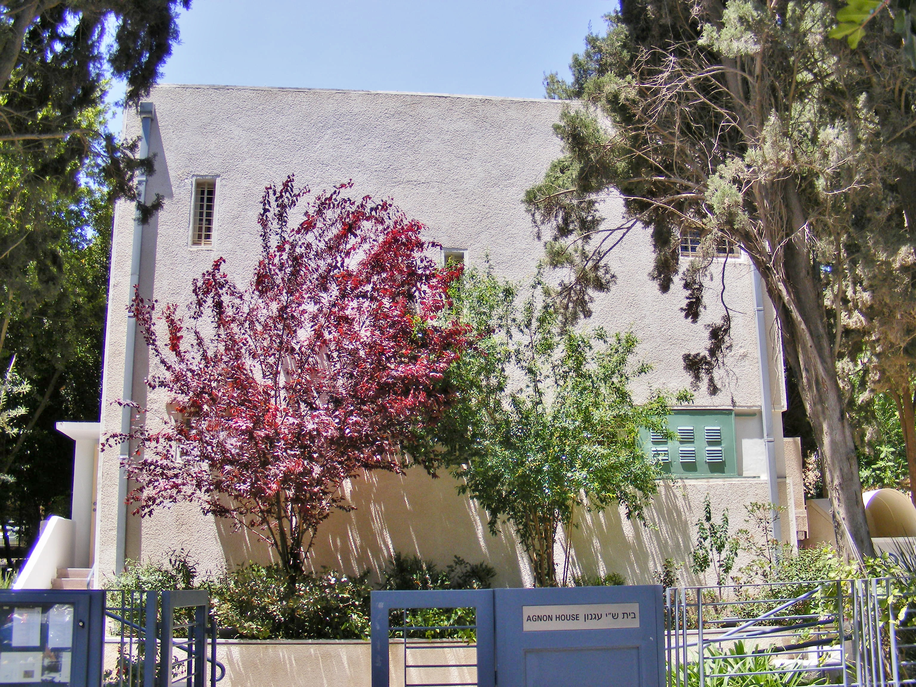 בית עגנון הוא הבית שבו התגורר הסופר ש"י עגנון, בשכונת תלפיות בירושלים, ברחוב קלוזנר 16. לבית מראה מבצרי וסגור, חלונות הברזל מסורגים. הוא בנוי בסגנון מודרני, בקוים ישרים ובמראה קובייתי, ומצופה בטיח. בבית נמצא כיום מוזיאון "בית עגנון בירושלים".